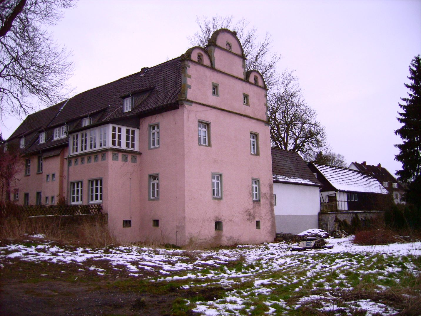 Forsthaus Obereimer